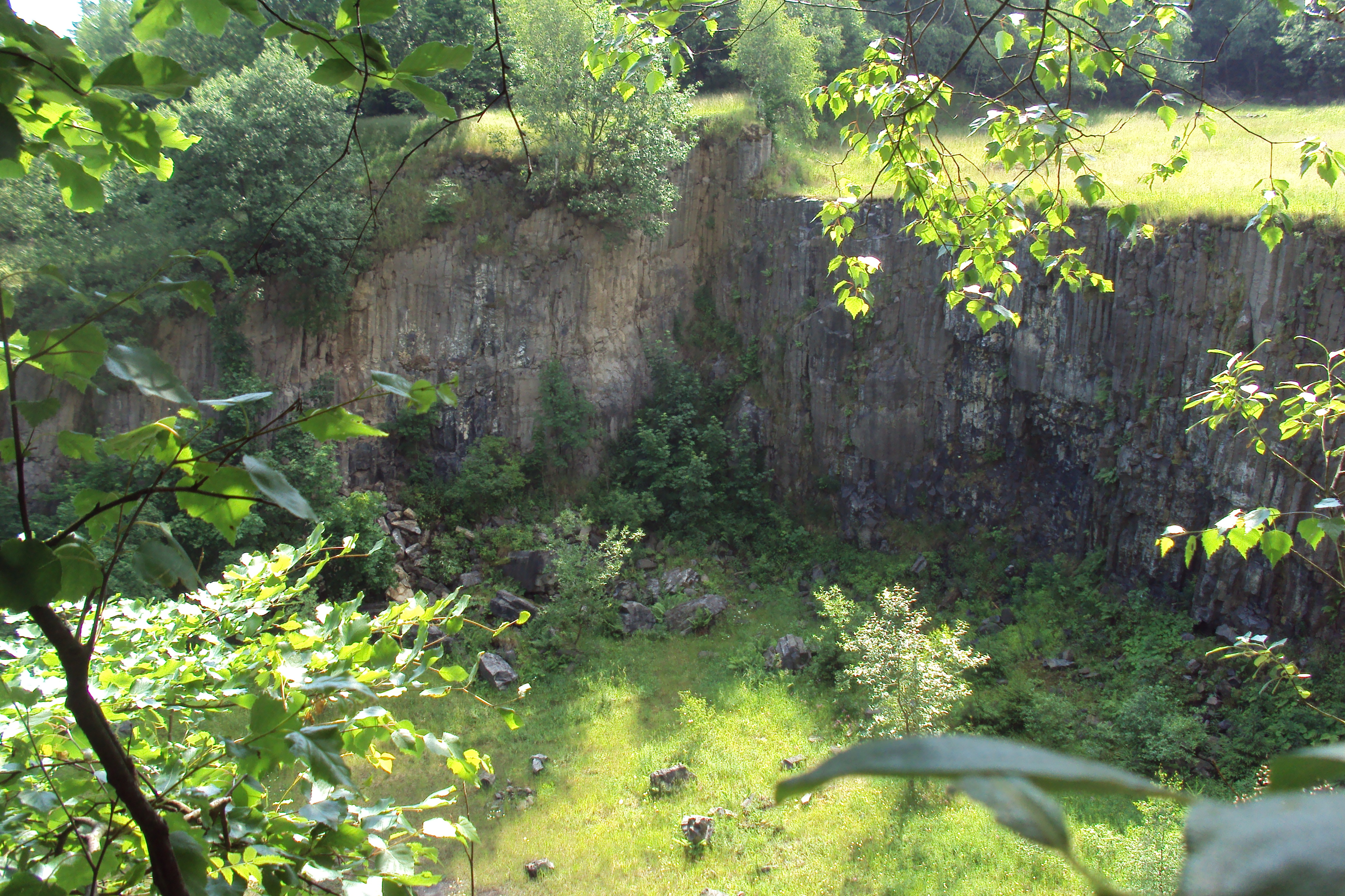 Opuštěný lom u kopce Klučky při silnici z Nového Boru do Polevska a Práchně, asi katastr Horního Prysku